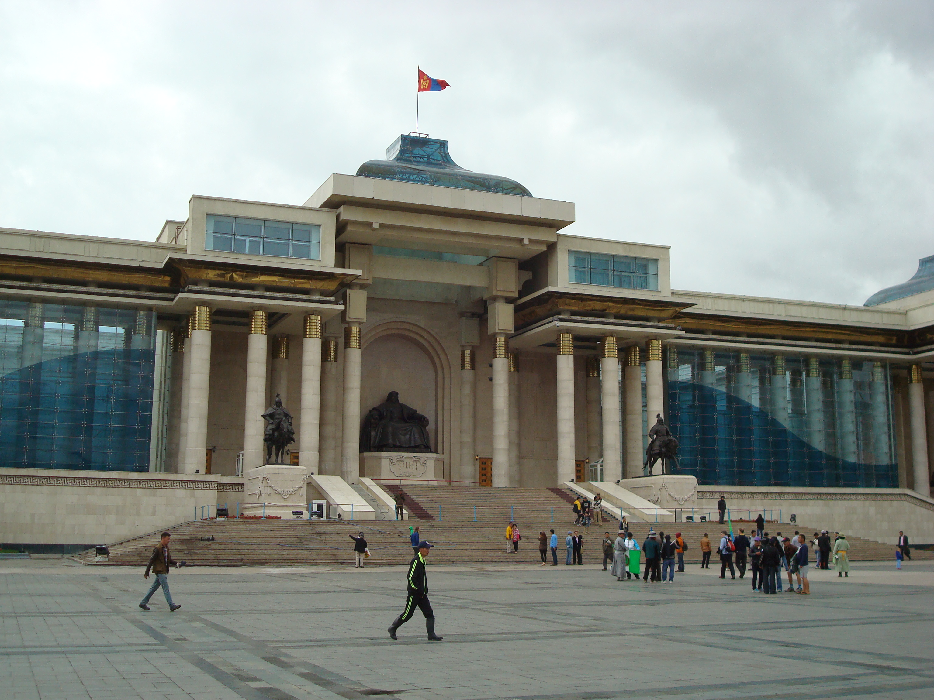 Regierungspalast am Sükhbaatar Square